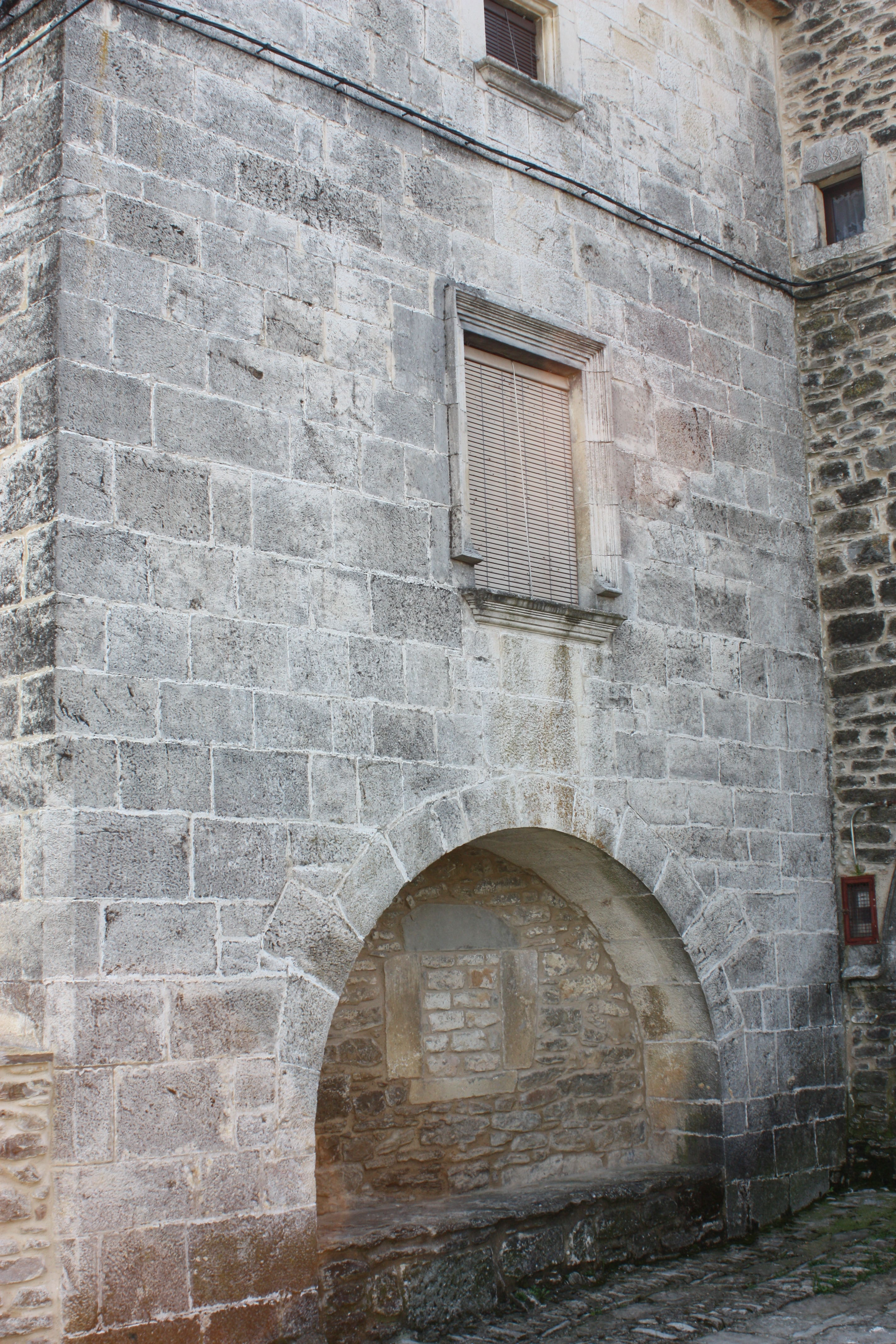 Fachada lateral de Casa Carruesco